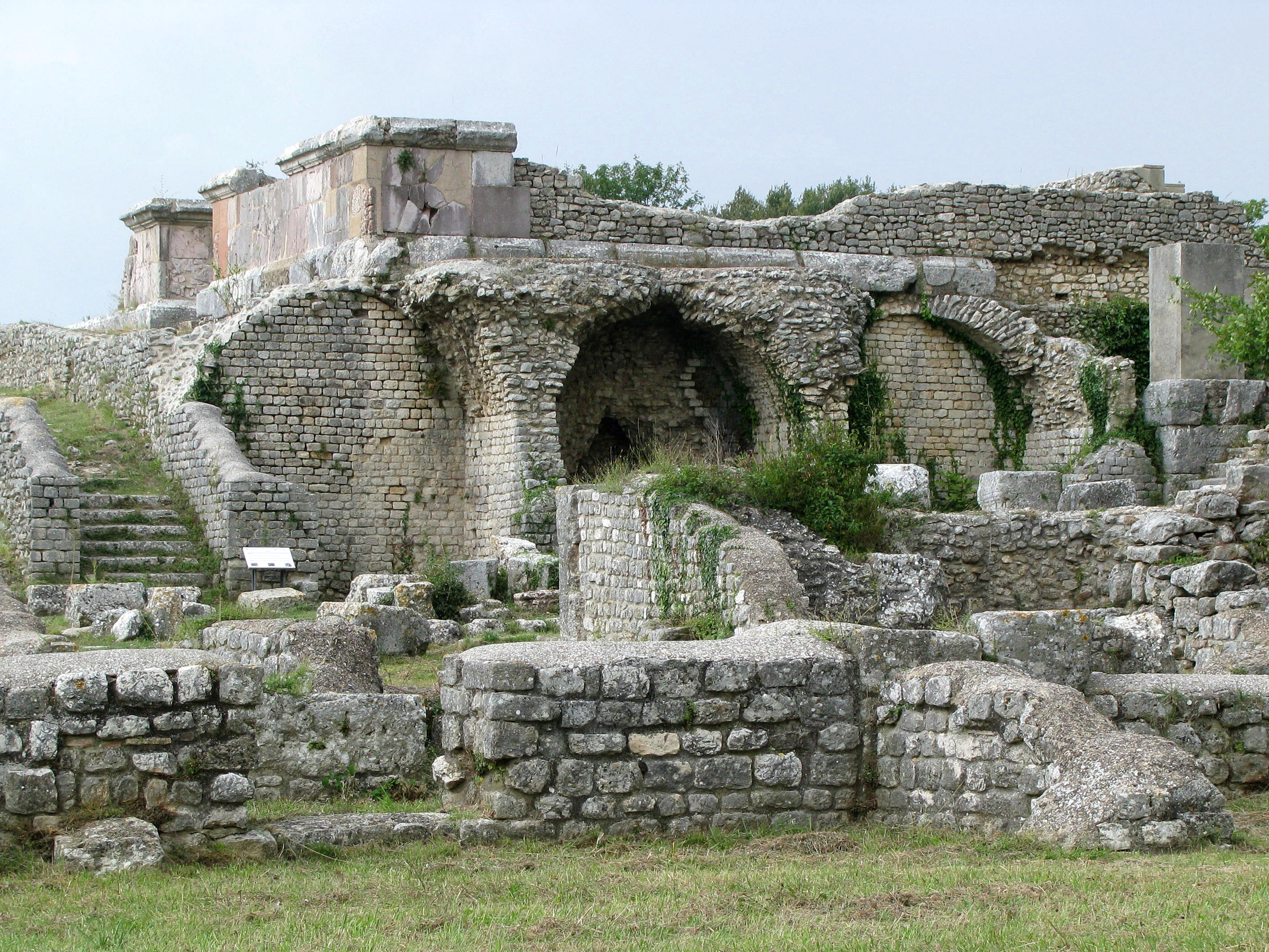 Area Archeologica di Carsulae - MIBAC This is a photo of a monument which is part of cultural heritage of Italy.